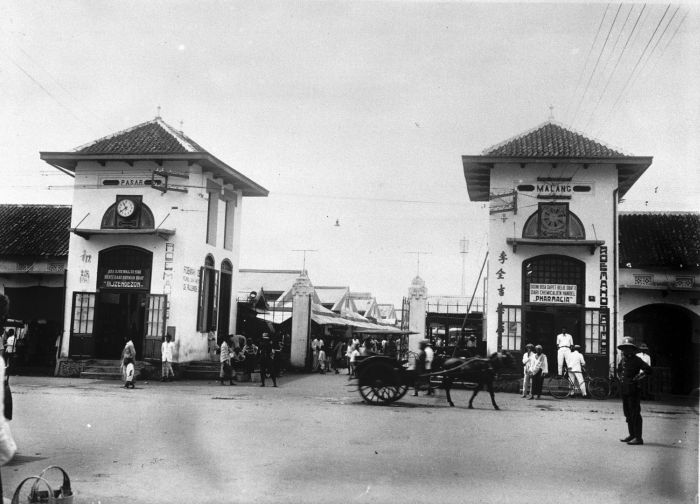 Foto. De gemeente Pasar te Malang.